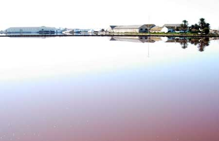 Instalaciones de Las Salinas en la actualidad.